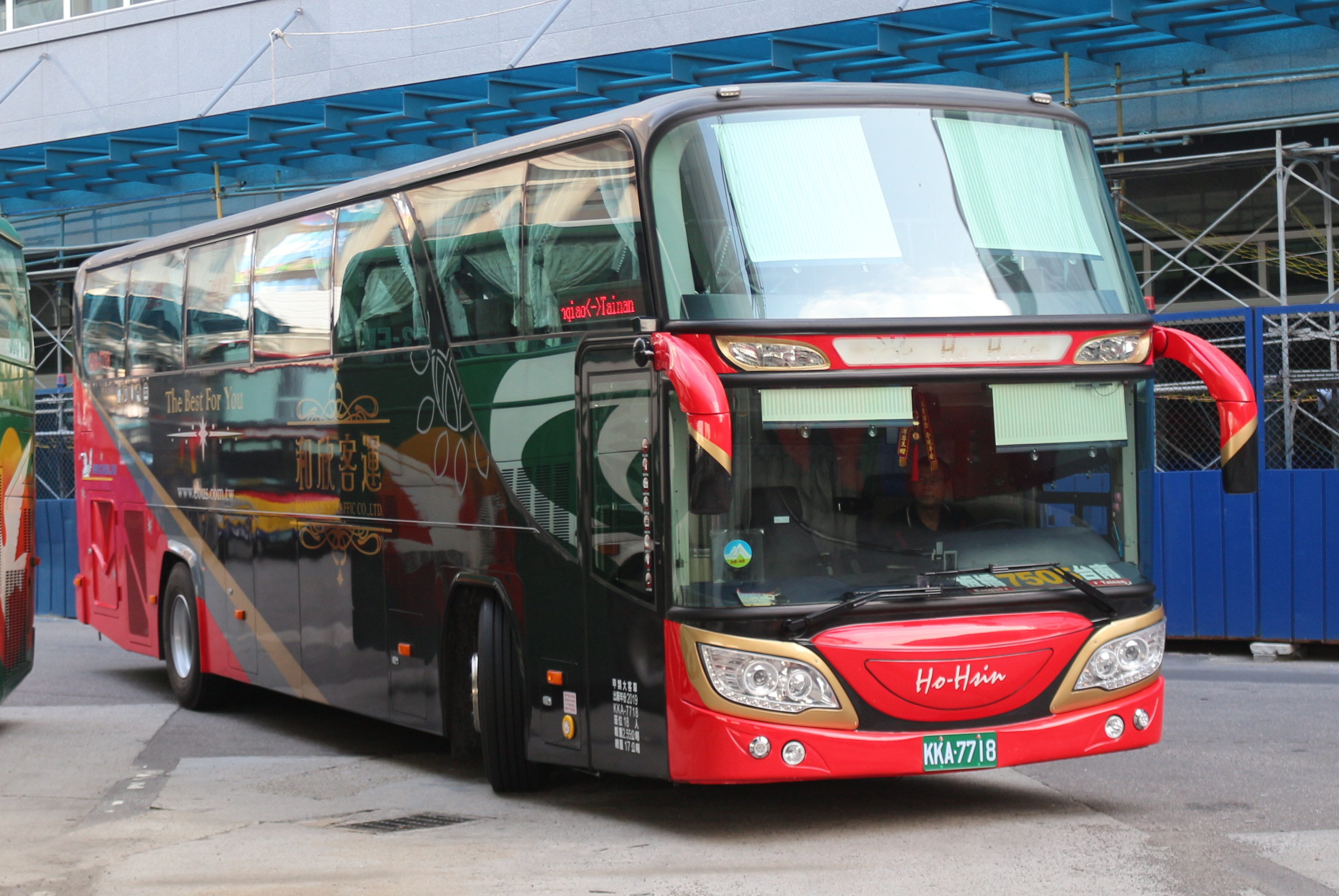 和欣客運2019 SCANIA K400IB4X2NB KKA-7718 7505